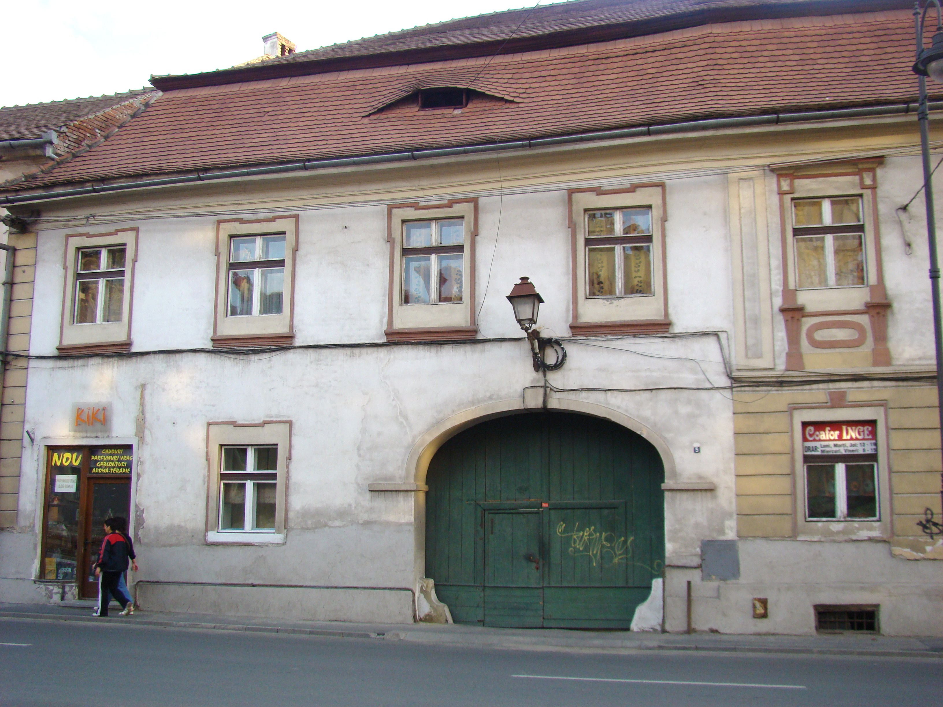 Clădire monument istoric, str.Andrei Șaguna, nr.5